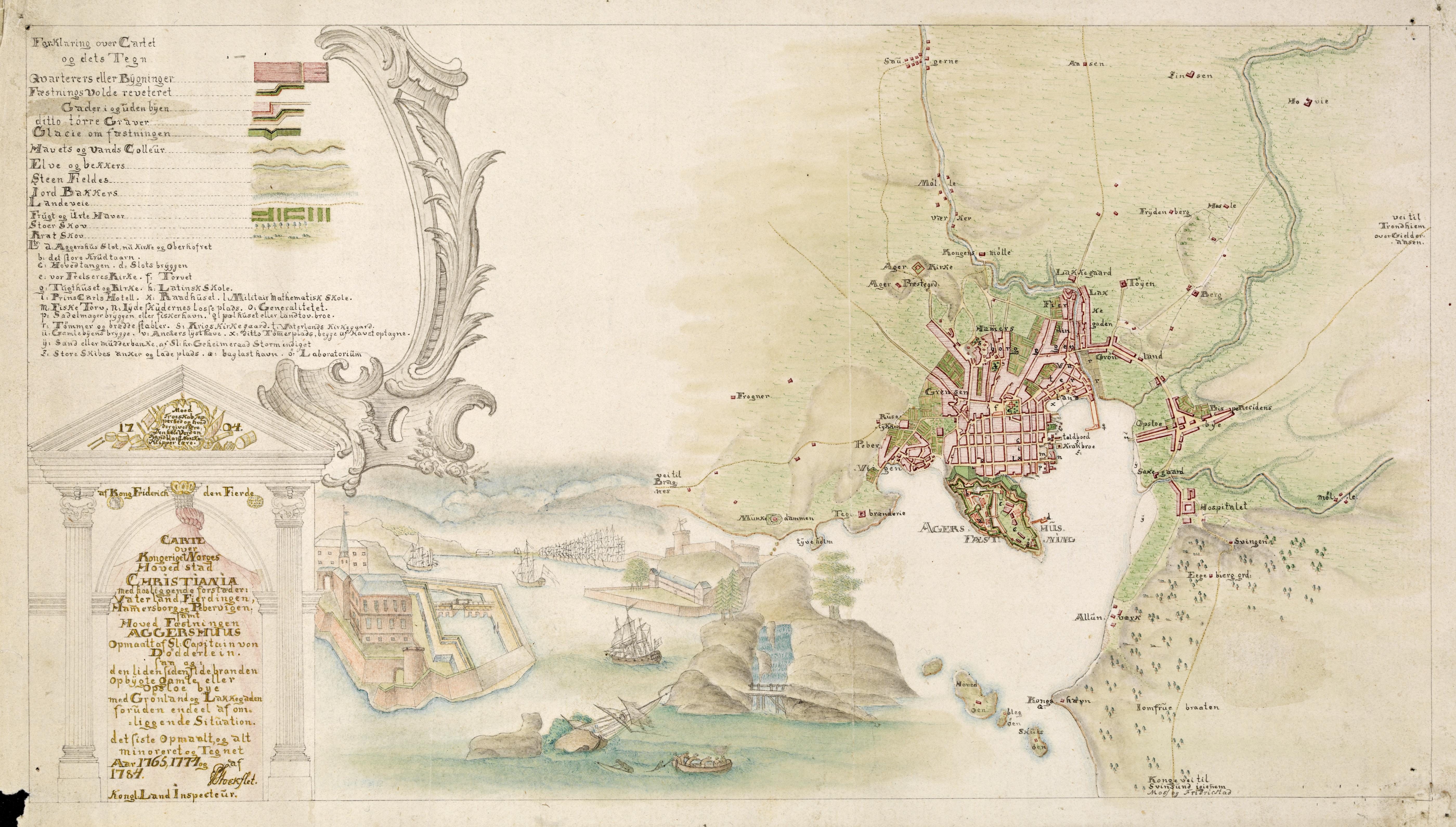 Tittel / Title: Carte over Kongeriget Norges Hovedstad Christiania med hosliggende forstæder Beskrivelse / Description: Håndtegnet kart over Christiania (Oslo) Dato / Date: 1784 Kartograf / Cartographer: P. Stockflet Digital kopi av original / Digital copy of original: no-nb_krt_00909 Eier / Owner Institution: Nasjonalbiblioteket / National Library of Norway Lenke / Link: Bildesignatur / Image Number: Kart 2535